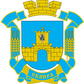 Герб міста Сквира